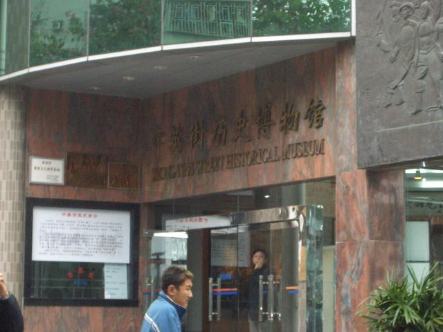 Chung Ying Street 廣東省沙頭角中英街, Guangdong, PRChina. Photo by me.